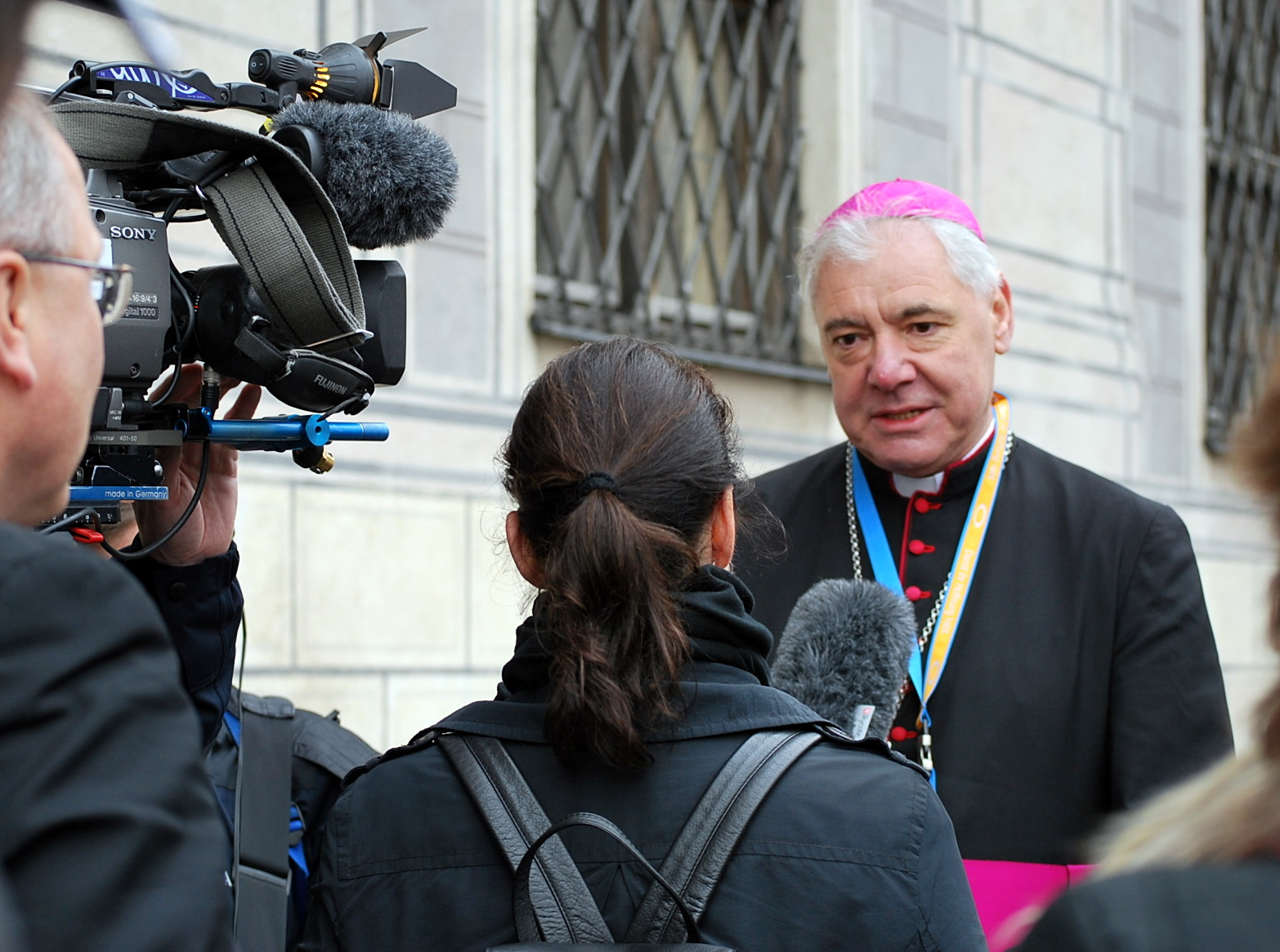 Auf jeder Straßenseite ein Interview: hier der Regensburger Bischof Müller...